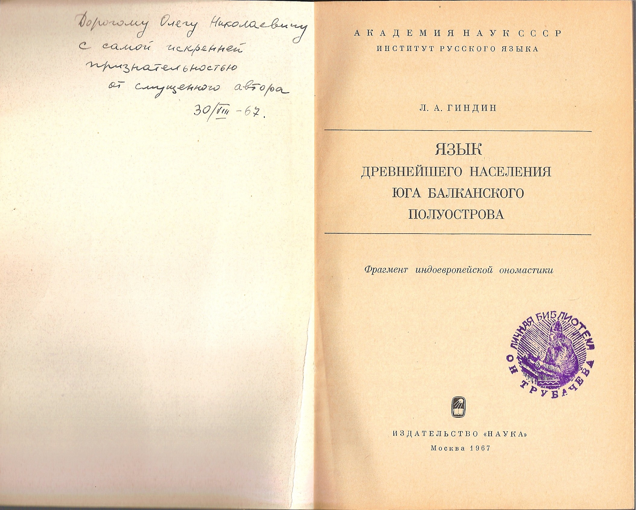 Автограф Л. Гиндина на экземпляре книги "Язык древнейшего населения юга Балканского п-ова", подаренной им своему науч. руков-лю, О.Н. Трубачеву.